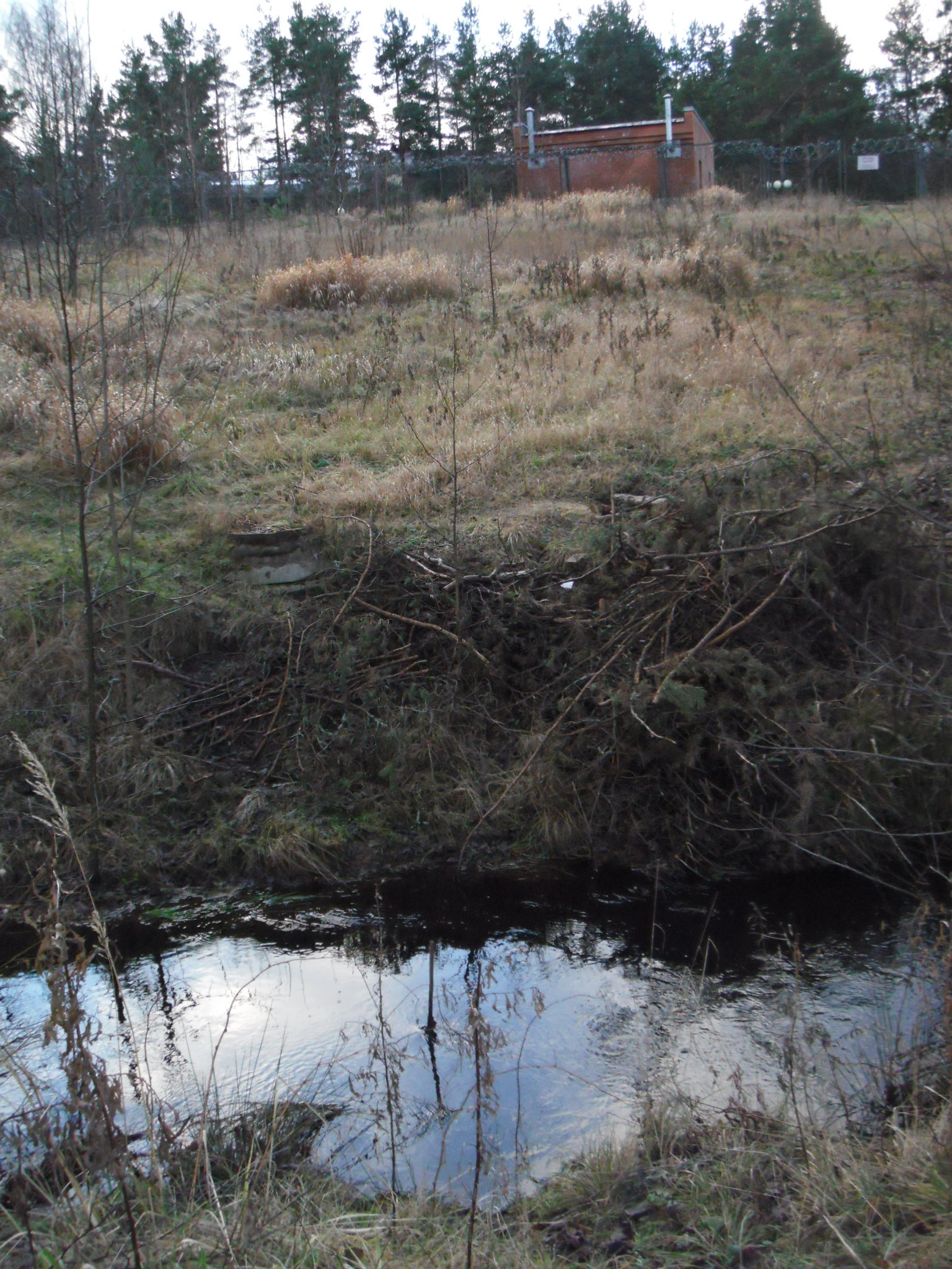 Сестрорецк на берегах Ржавой канавы